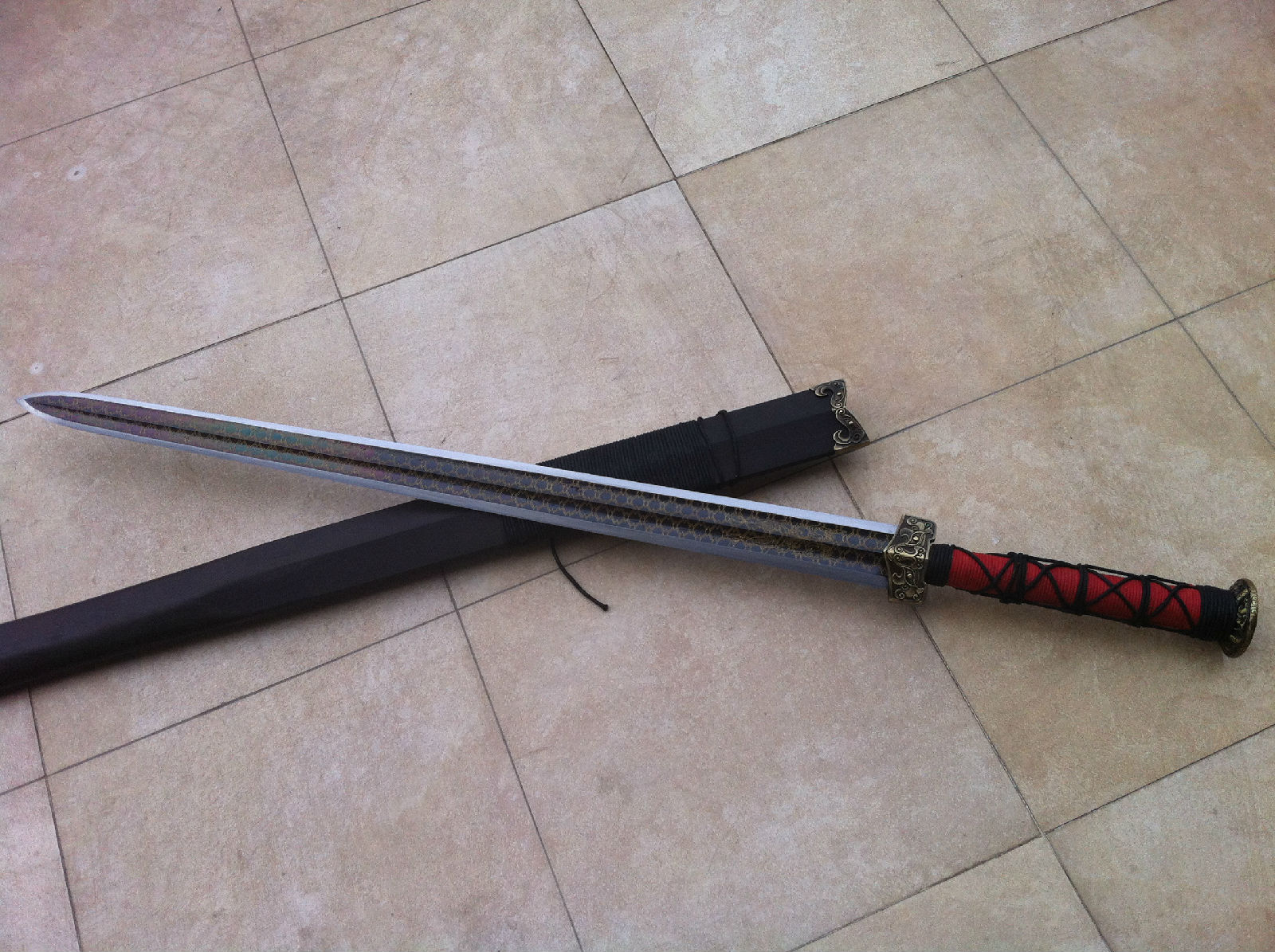 汉剑阿斯蒂芬